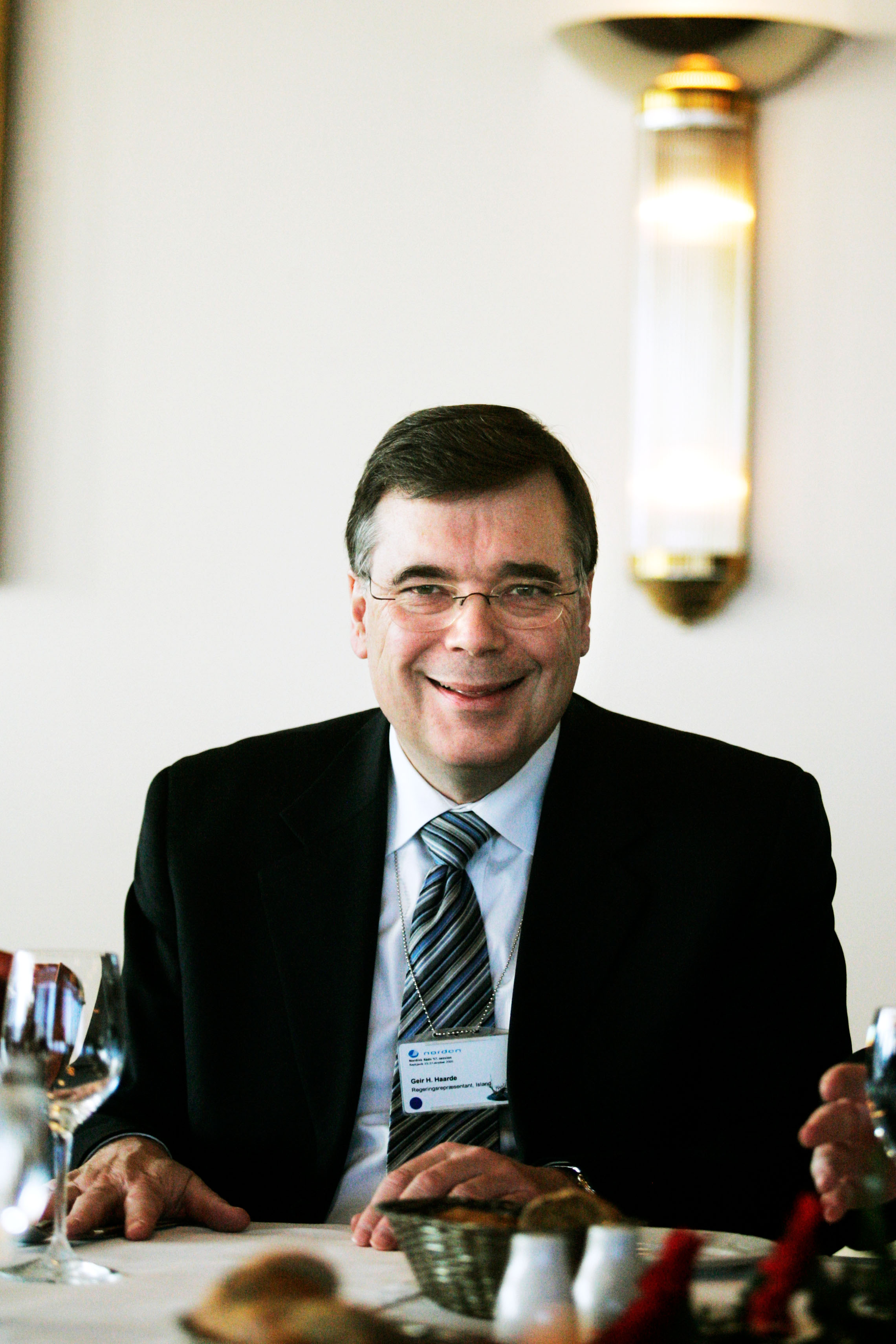 Geir H. Haarde Islands utrikesminister.